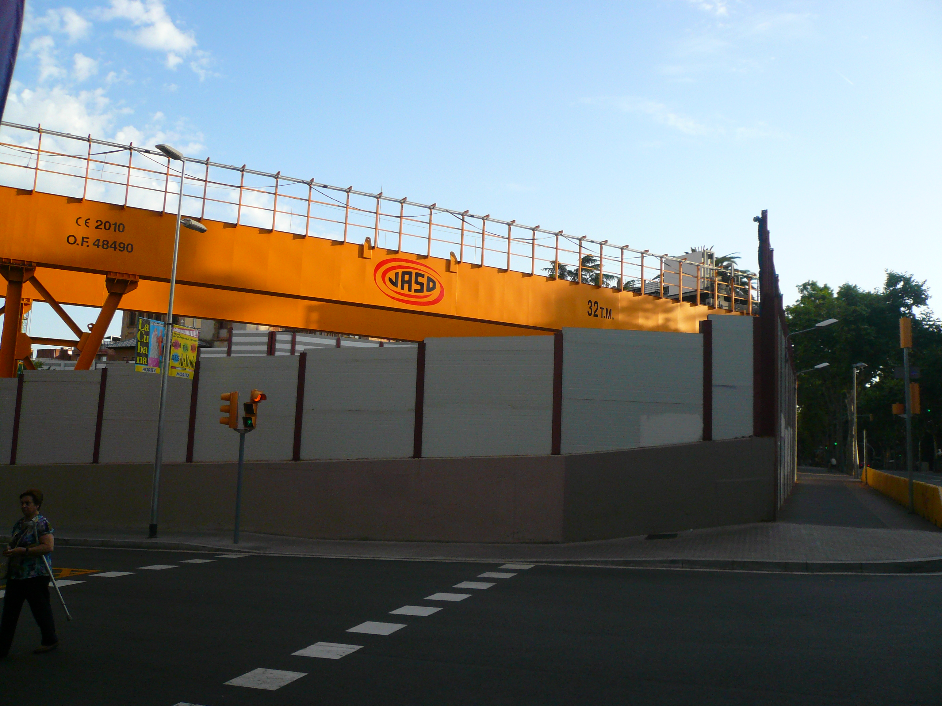 Obres (aturades) de l'estació de Mandri de la línia 9 del metro de Barcelona.